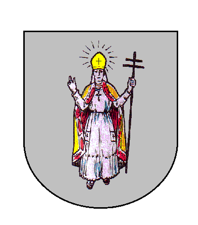 Escut municipal de l'ajuntament desaparegut d'Aramunt (Conca de Dalt, Pallars Jussà)